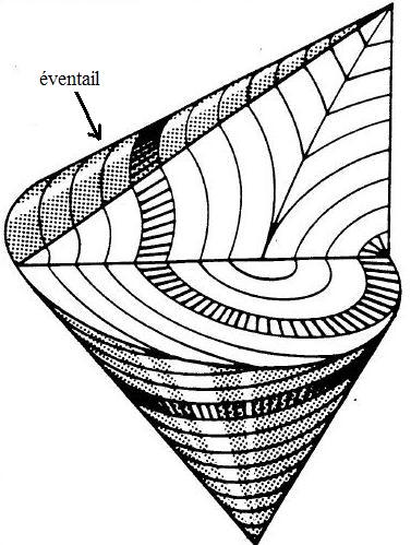 Schéma d'une «conique focale» à l'origine texture «en éventail» mésophases smectiques.